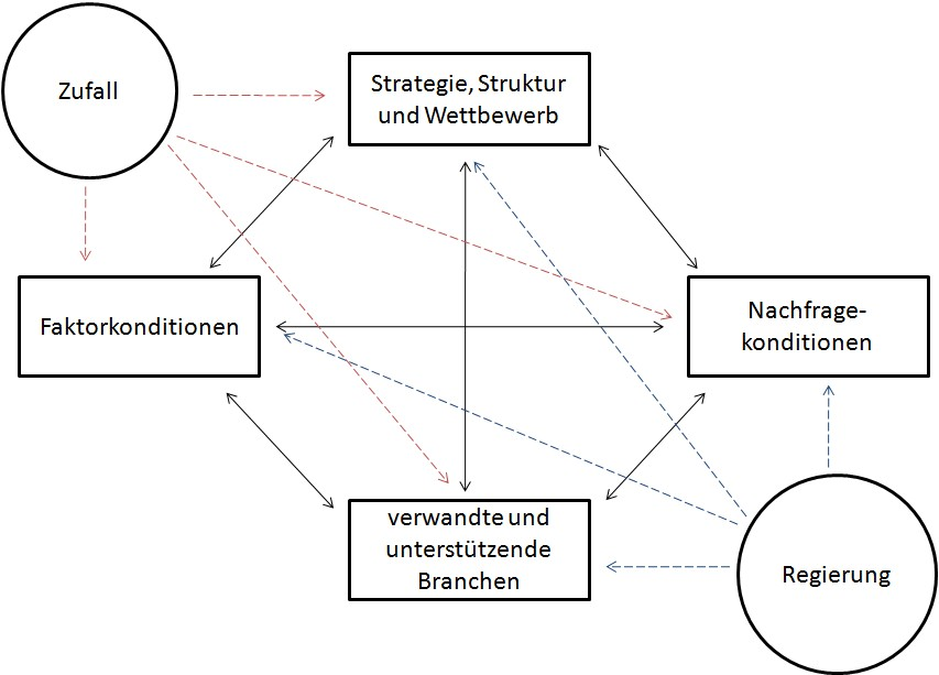 vollständiger Porter's Diamond